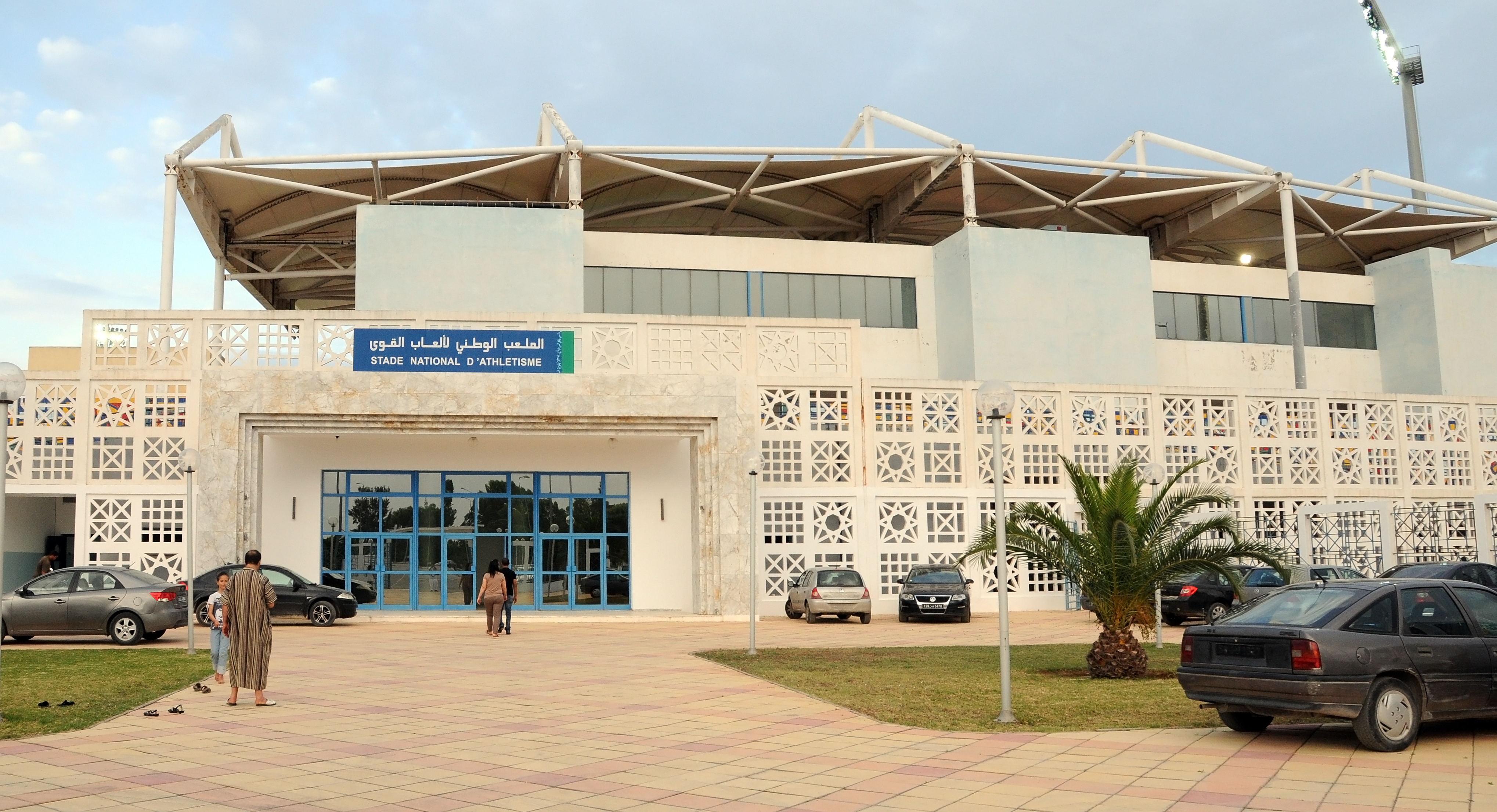 Vue extérieure du stade d'Athlétisme de Radès.